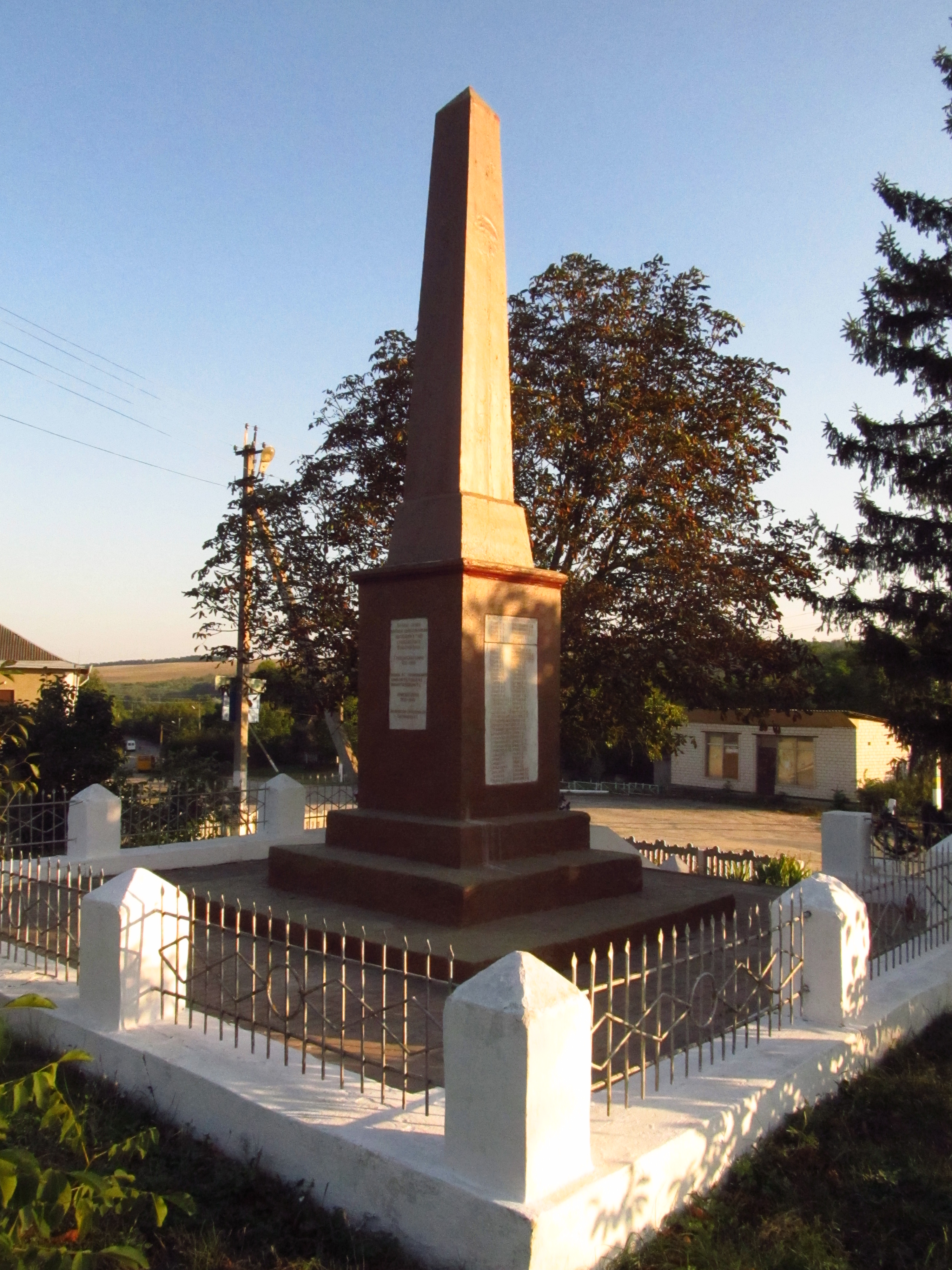 Пам'ятник 230 воїнам-односільчанам, загиблим на фронтах Великої Вітчизняної війни. Обеліск, Обжиле, біля Палацу Культури